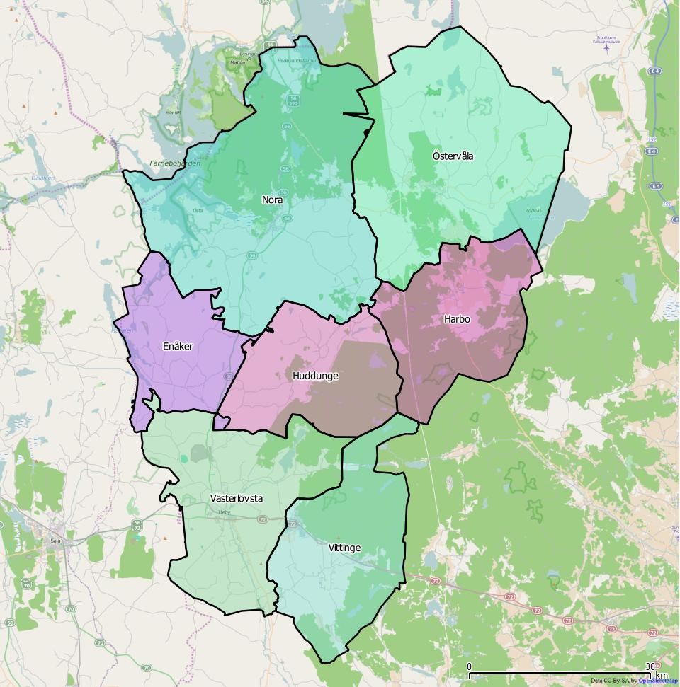 Distriktsindelningen i Heby kommun